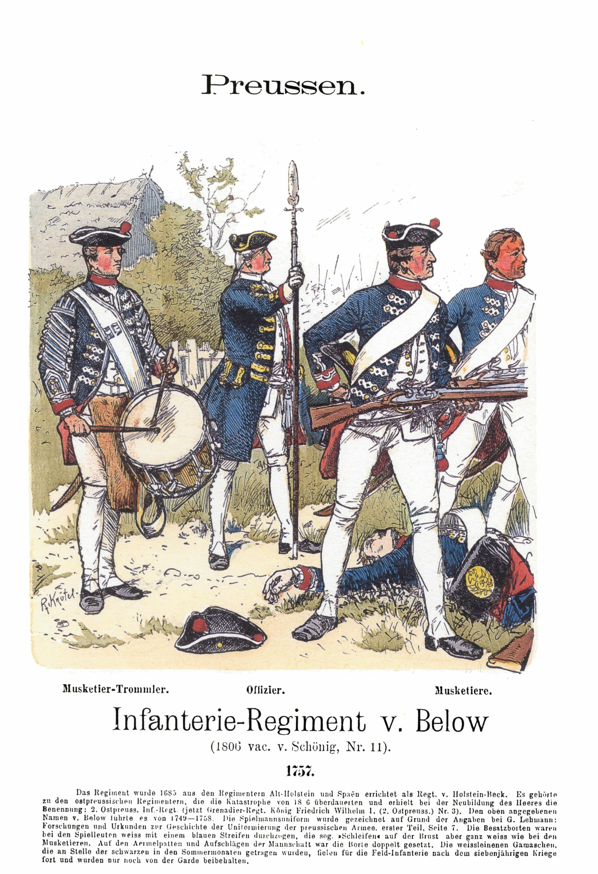 Preußisches Infanterieregiment Nr. 11, 1757